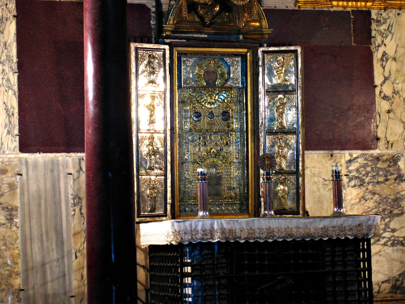 Immagine detta acheropita (non dipinta da mano d'uomo) del Sancta Sanctorum della Scala Santa. Roma.